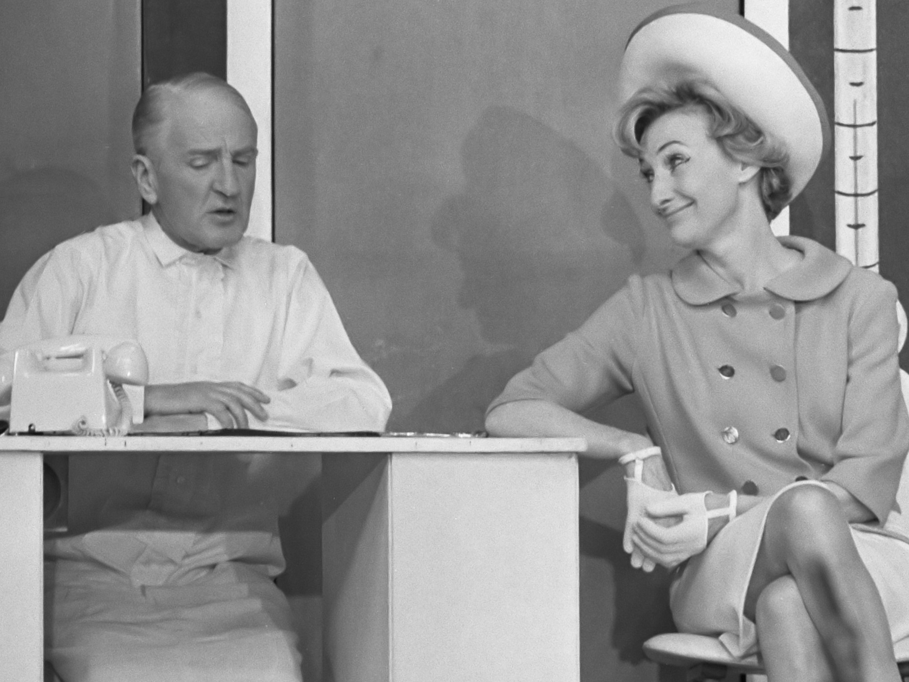 TV-opnamen van de Snip-en-Snap Revue; Willy Walden en Aase Rasmussen 13 april 1970